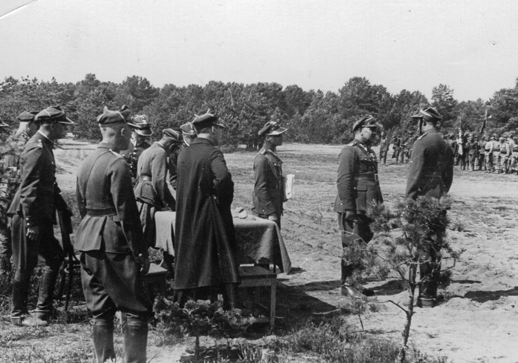 Podczas manewrów w 1936 roku